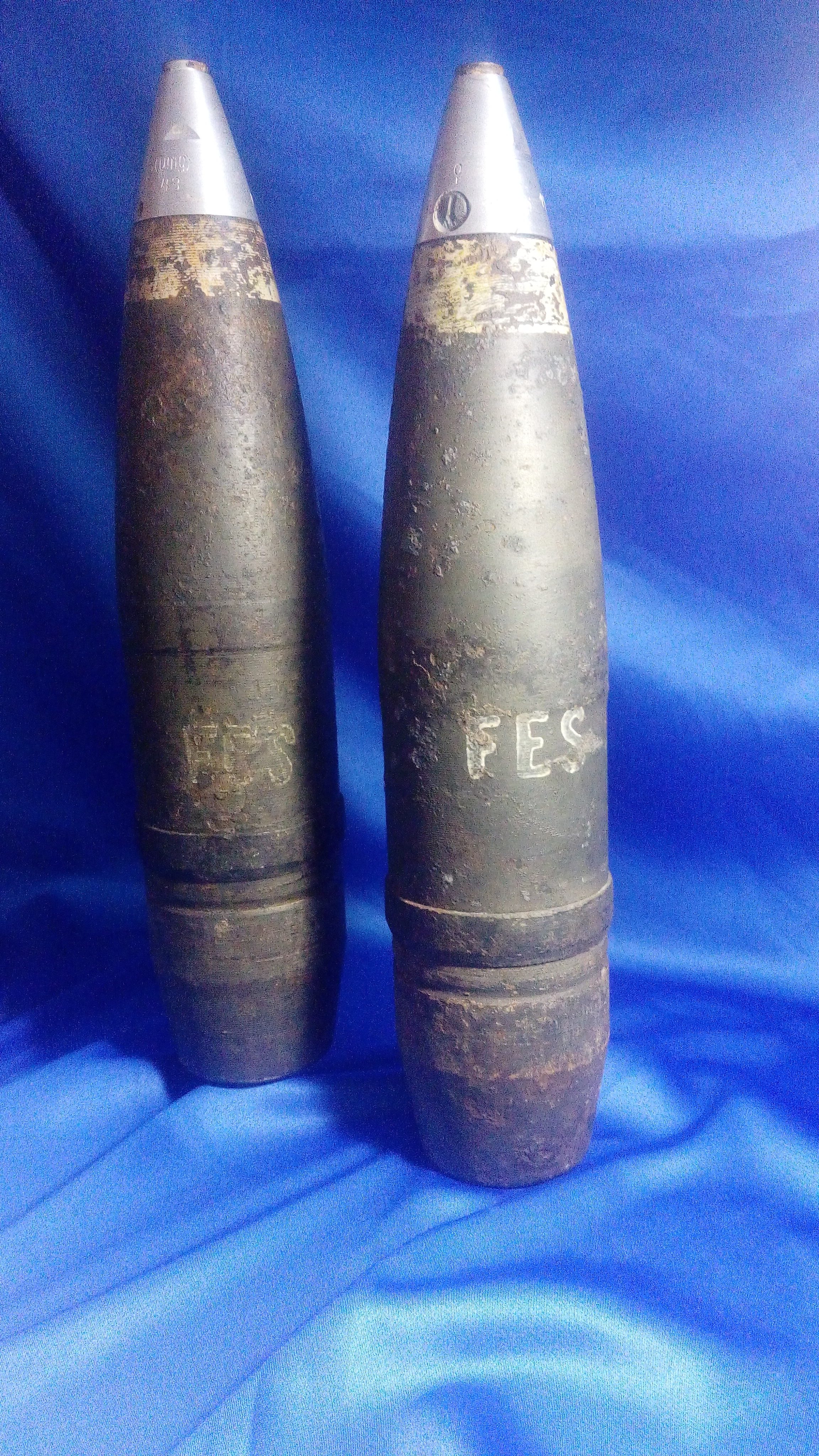 Осколочно фугасные 7,62cm Pak 36